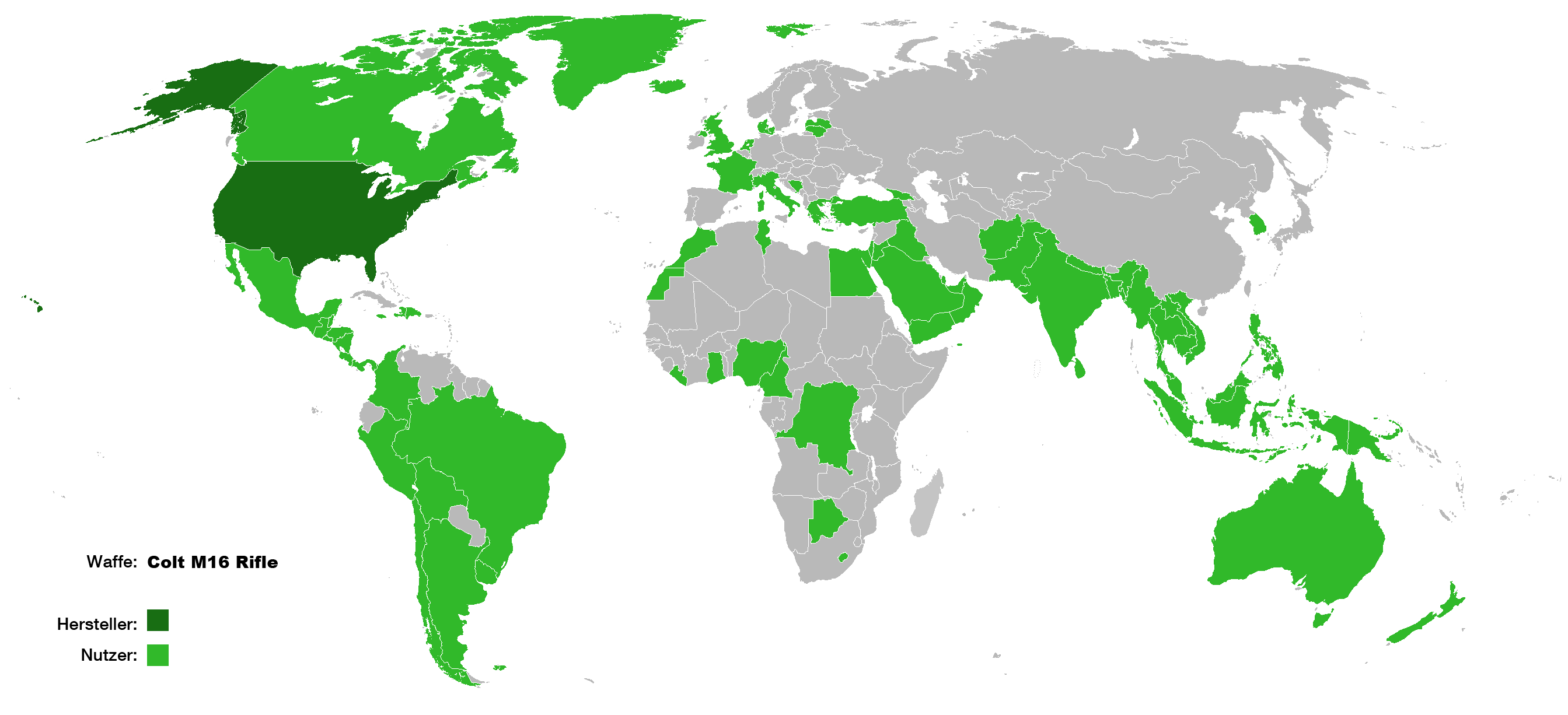 Verbreitung des Sturmgewehr ColtM16